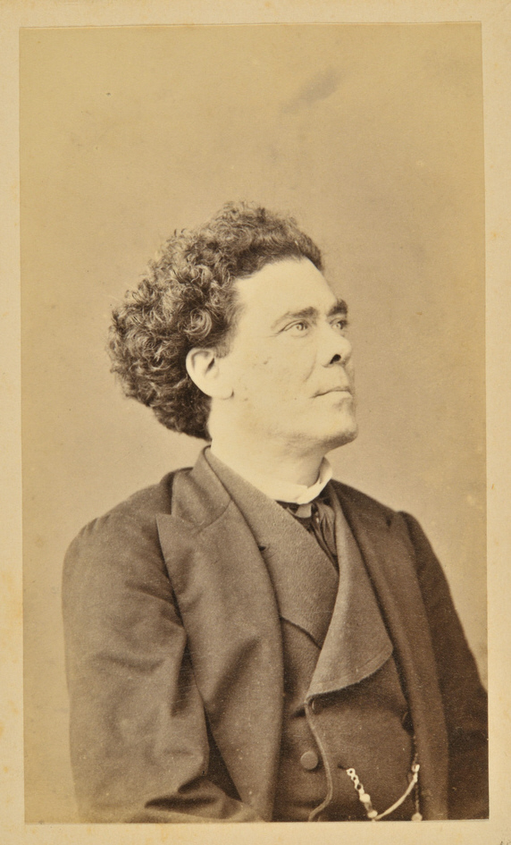 The portuguese actor Taborda in his best years